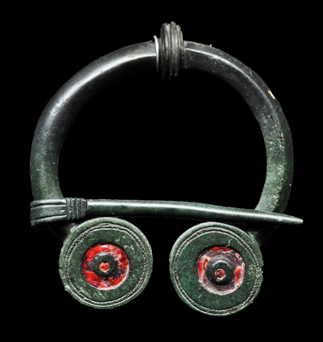 Фібула падковападобная з выемкавай эмаллю чырвонага колеру. І-ІІІ стст. Бронза, эмаль. Гарадзішча Малышкі Вілейскага раёна Мінскай вобласці. Раскопкі А.Р. Мітрафанава.